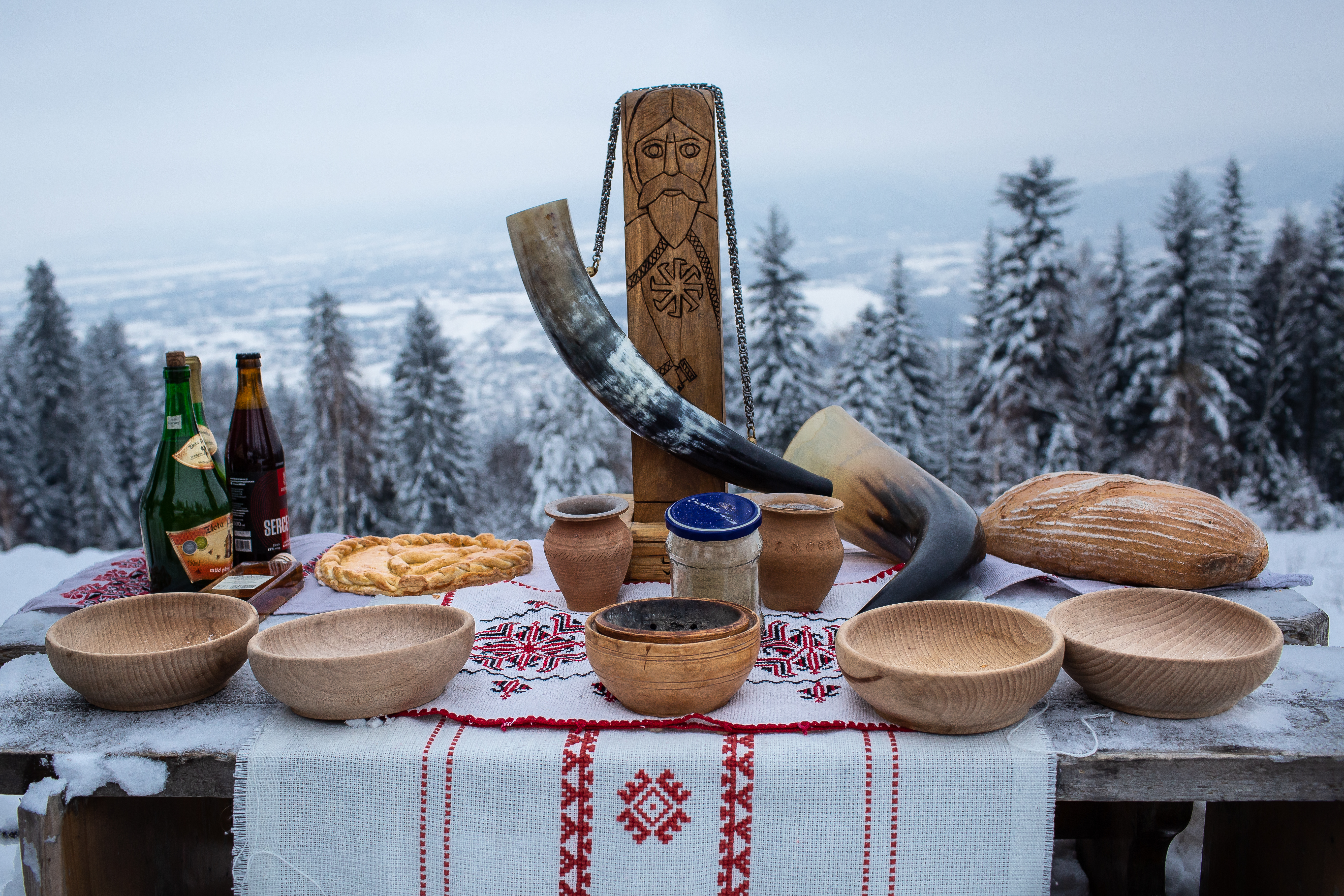 Szczodre Gody MIR